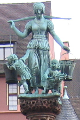 Der Brunnen auf dem Freiburger Kartoffelmarkt